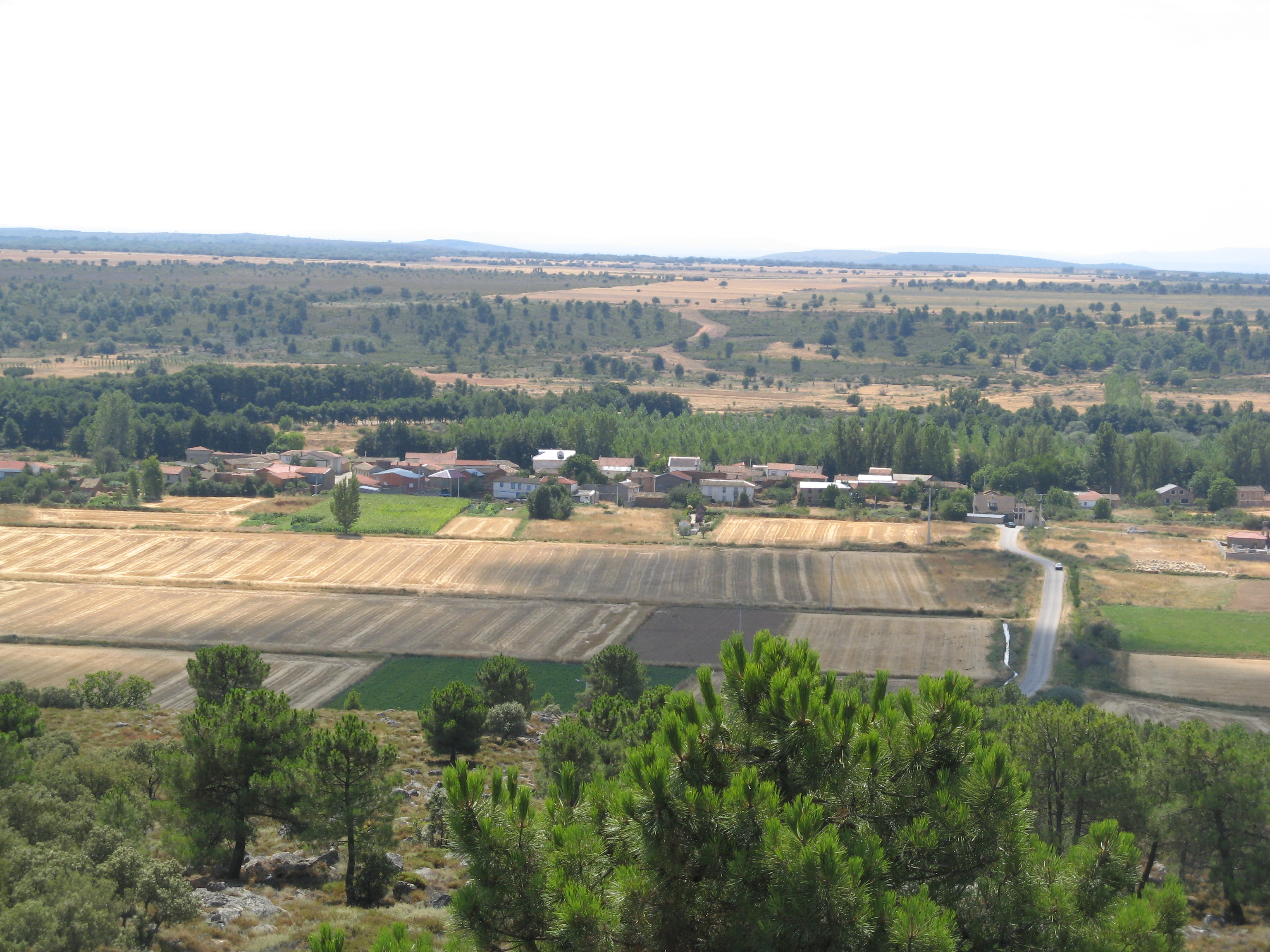 Imagen de Pobladura de Yuso vista desde Castrión, en la provincia de León, España